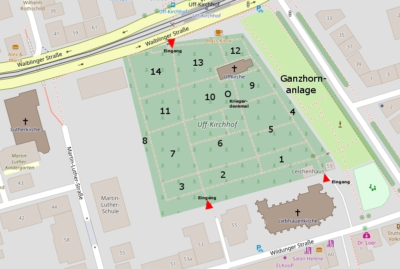 Plan des Uff-Kirchhofs in Stuttgart.